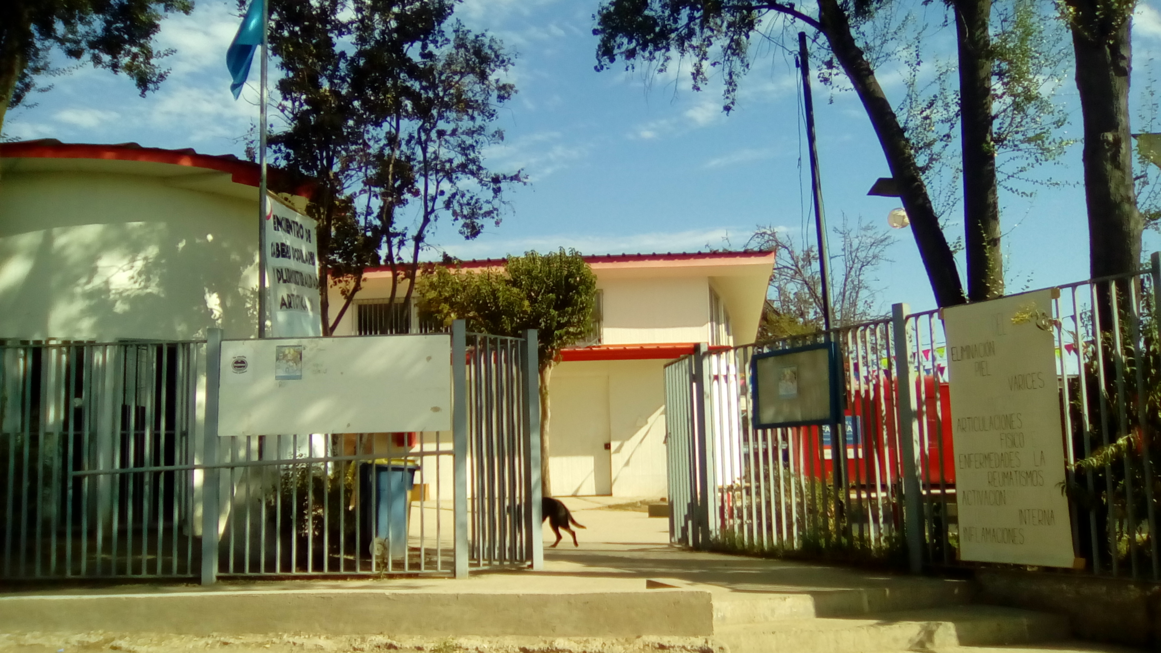 Frontis del Centro Cultural